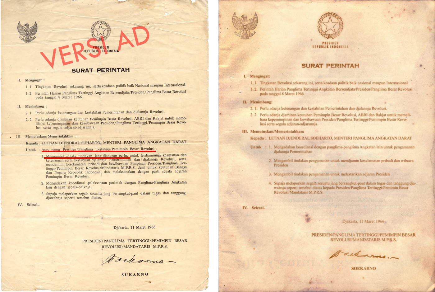 Perbandingan Supersemar